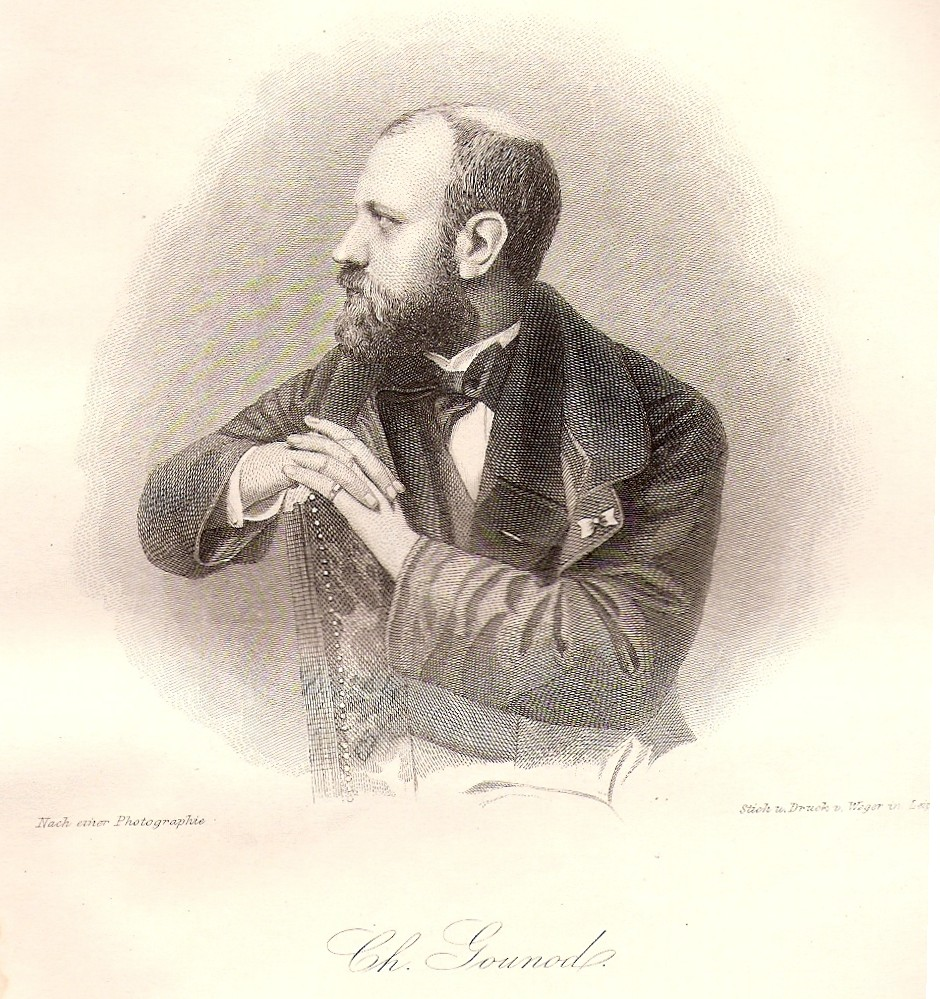 Stahlstich von Charles Gounod in der Allgemeine Moden-Zeitung (1863)